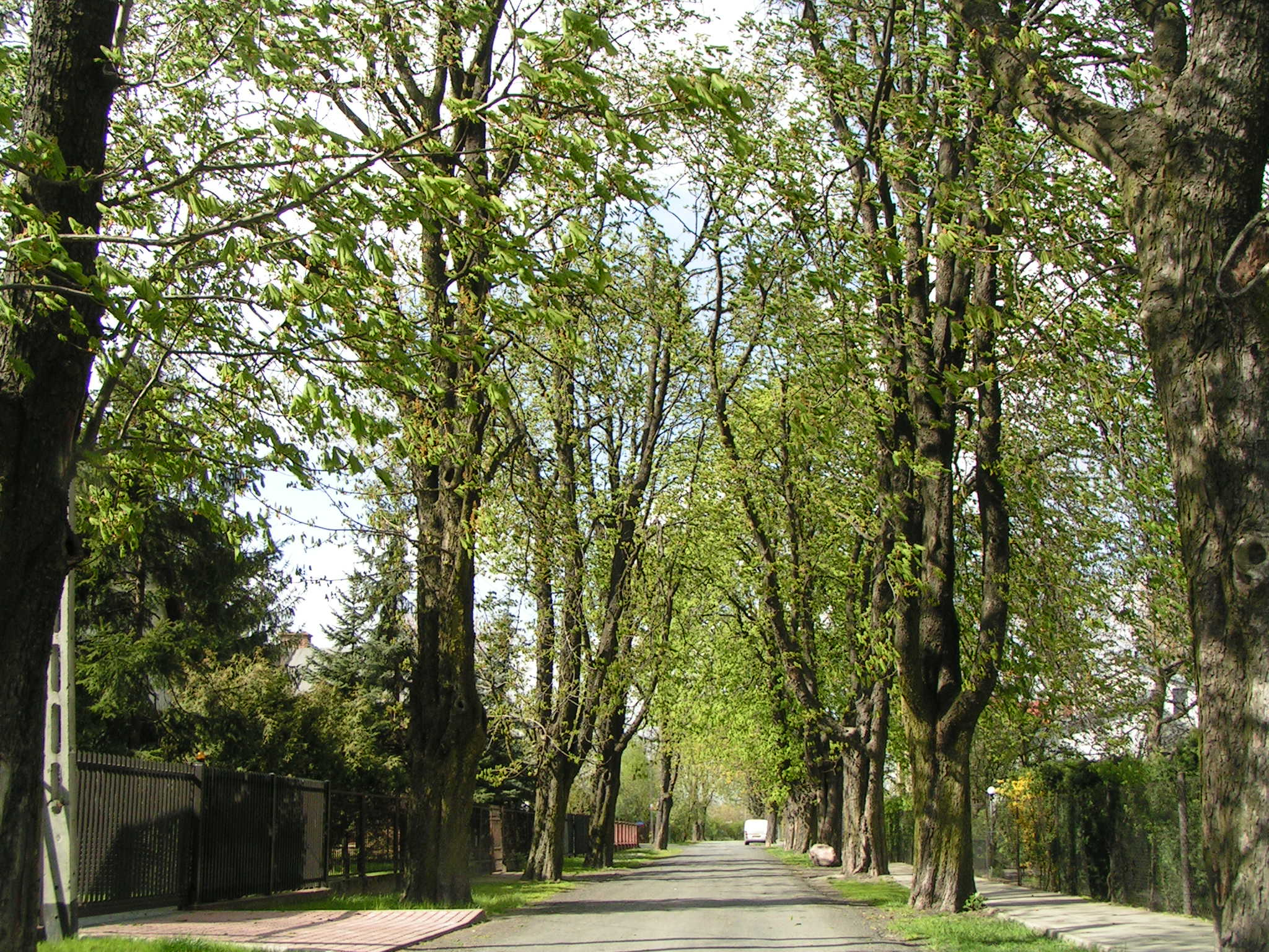 ulica w Gołąbkach